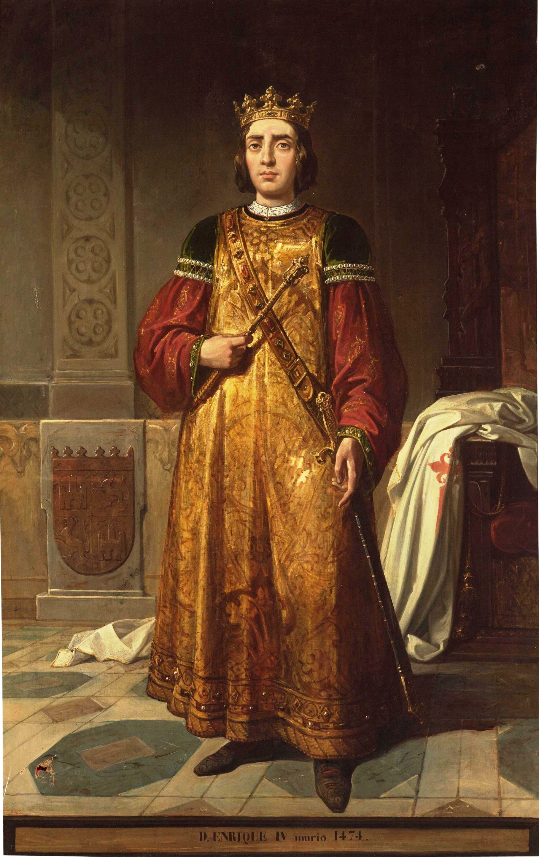 Retrato imaginario del rey Enrique IV de Castilla (1425-1474). Fue hijo del rey Juan II de Castilla y de la reina María de Aragón. Falleció en Madrid en 1474, a los 49 años de edad y fue sucedido en el trono por su hermanastra, la reina Isabel I de Castilla.